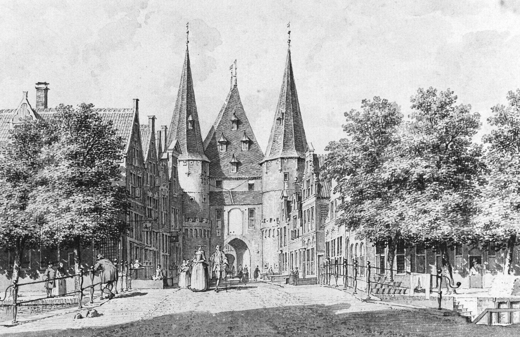 De Poelepoort door Cornelis Pronk. Reproductie van de oorspronkelijke pentekening. Door mij iets verscherpt en overbelichting iets verminderd.